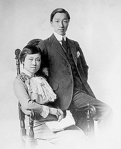 盛恩颐夫妻照